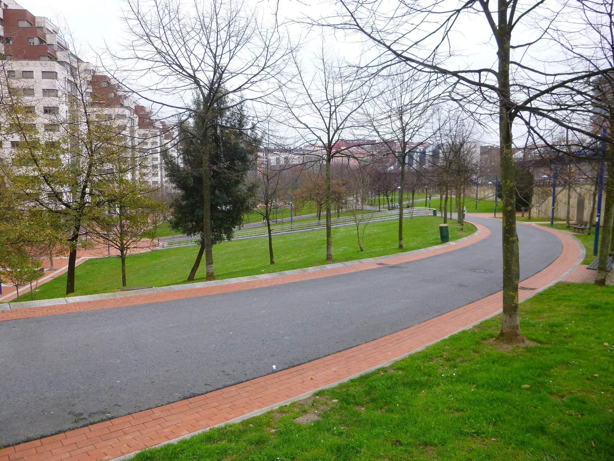 Parque de Ametzola (Bilbao)